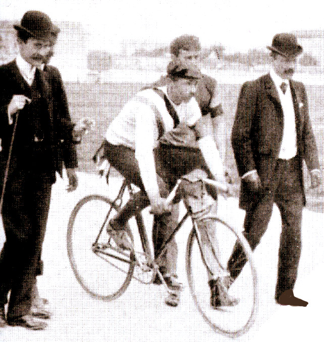 Tour de France 1903. Winner Garin Der Sieger Garin. Le vainqueur Garin. El vencedor Garin. Победитель Гарин.